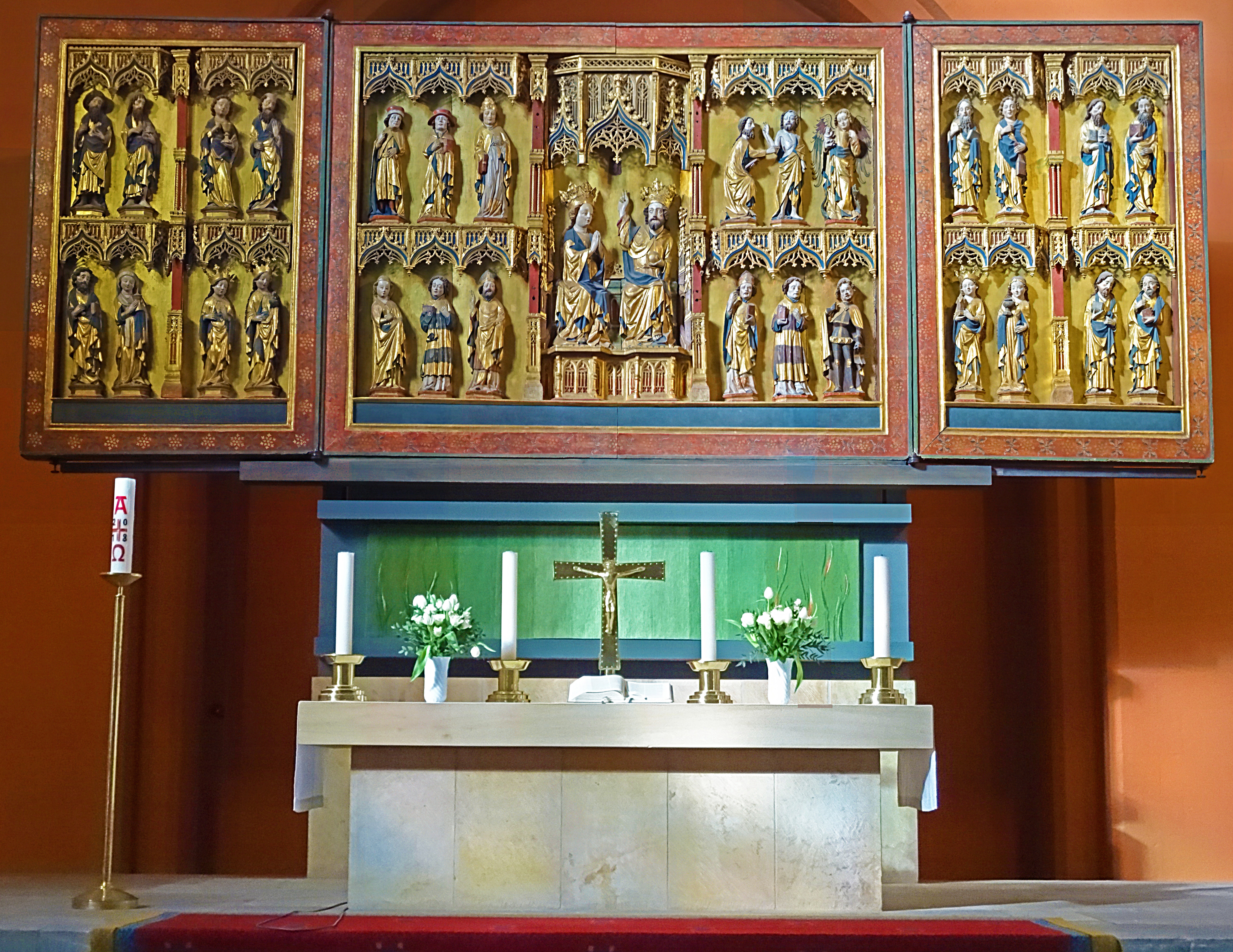 Der gotischer Flügelaltar in der Thomaskirche zu Erfurt wurde zwischen 1440 und 1448 von einem Erfurter Meister gefertigt.[1]